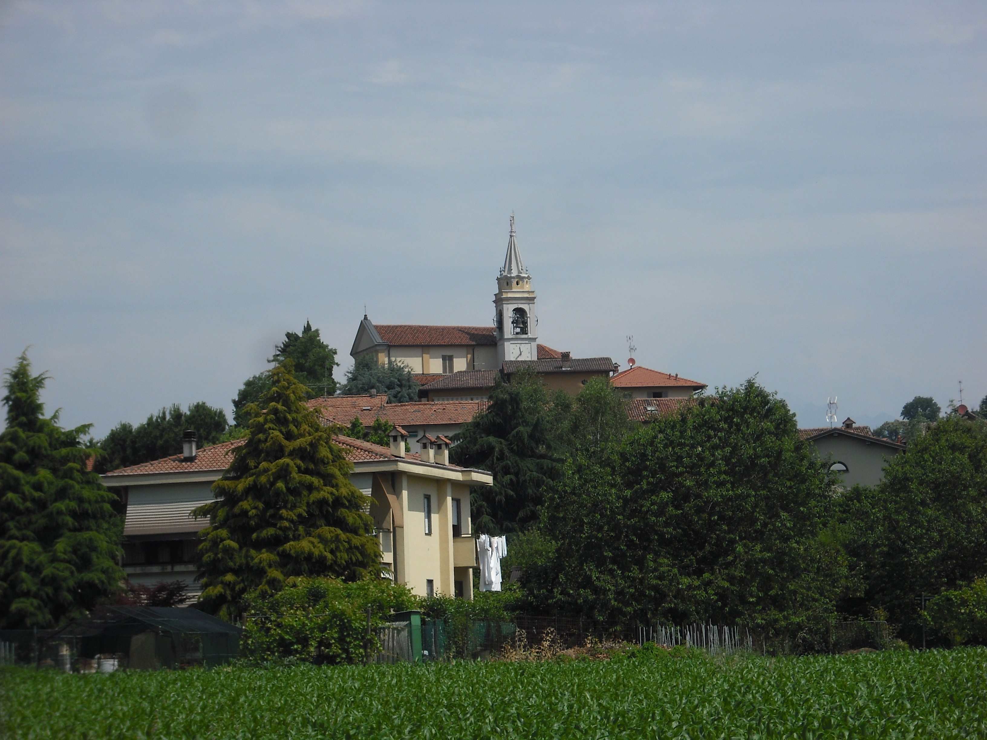 La chiesa parrocchiale di Novate di Merate (Lc)